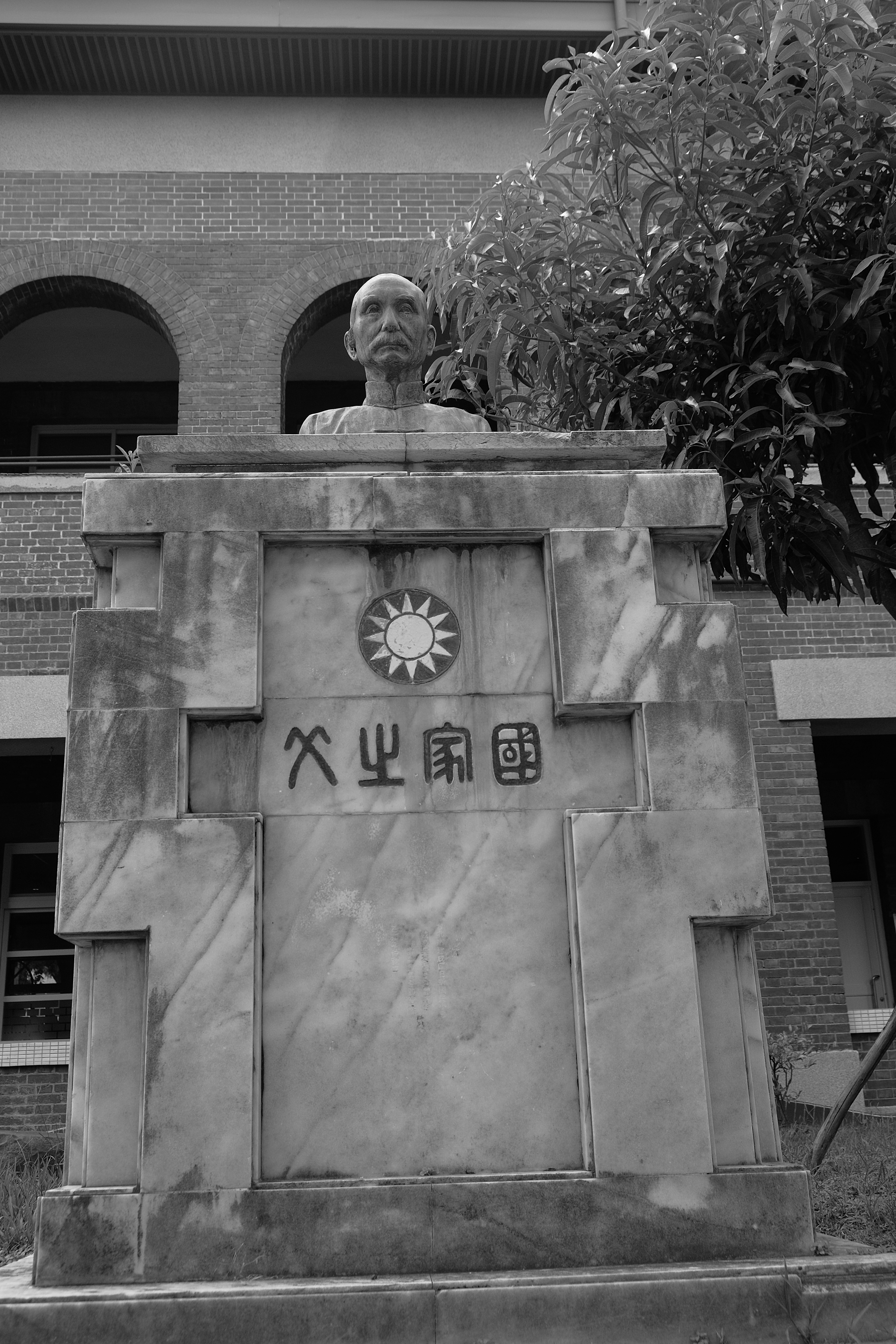 中文（台灣）: 臺北市大同區日新國民小學孫中山胸像。